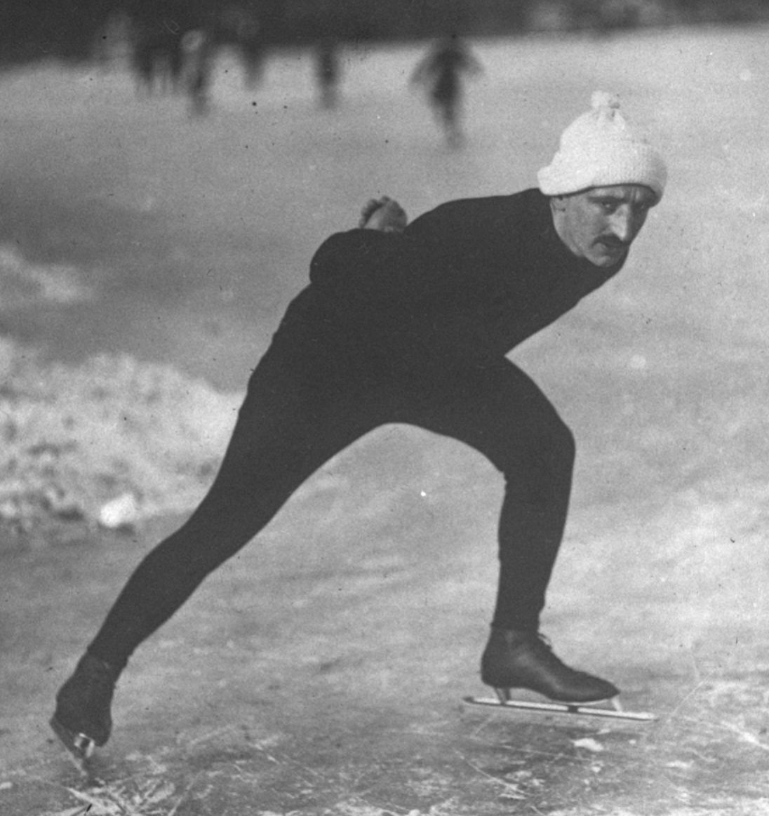 De Koming [un patineur de vitesse sur glace] : [photographie de presse] / [Agence Rol]